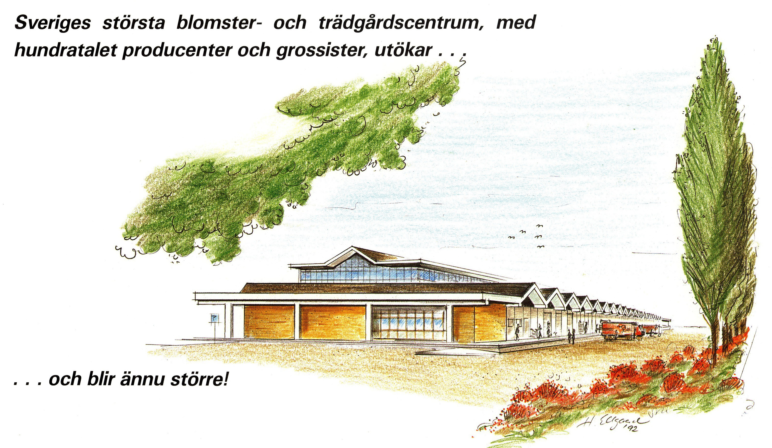 Förslag till utökning genom en påbyggnad av Trädgårdshallen på Årsta Partihallarna i Stockholm (blev ej genomförd)